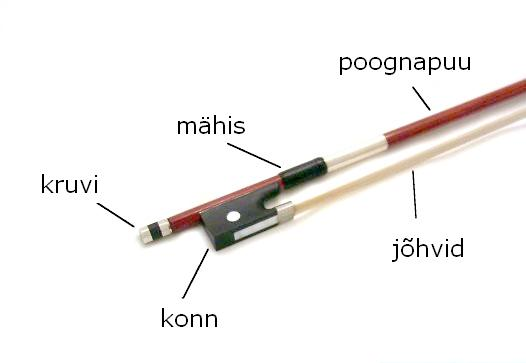 Poogna osad